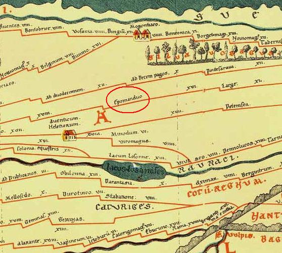 Extrait de la Table de Peutinger, montrant la cité de "Epomanduo" (Epomanduodurum), cité actuelle de Mandeure en France.